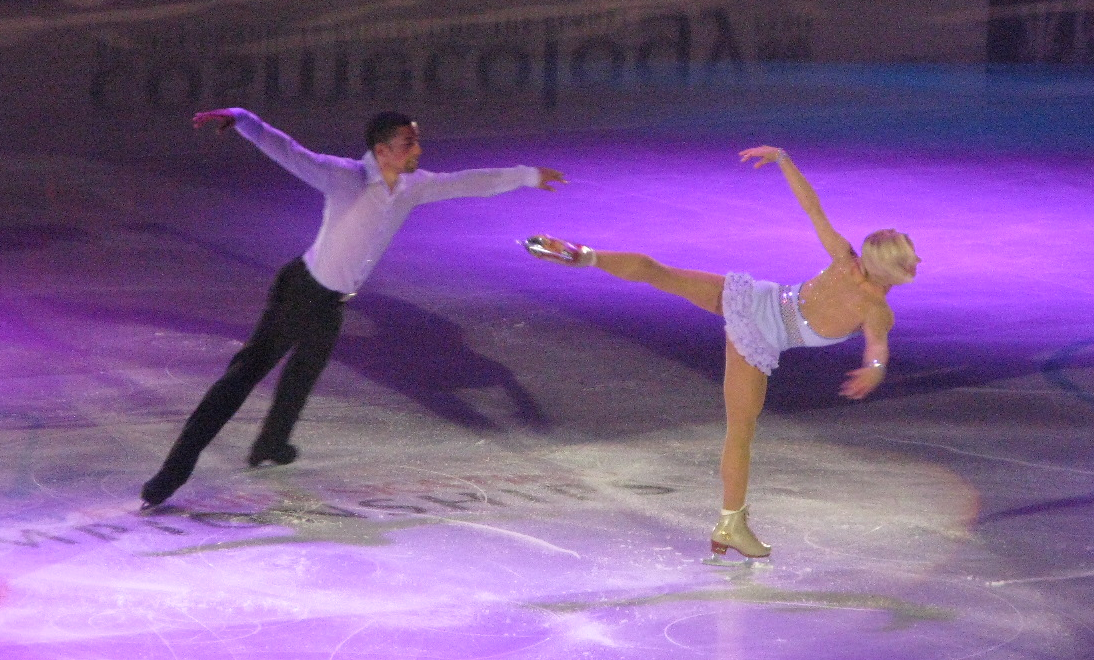 Aliona Savchenko et Robin Szolkowy au gala des Championnats du monde de patinage artistique 2012 à Nice.